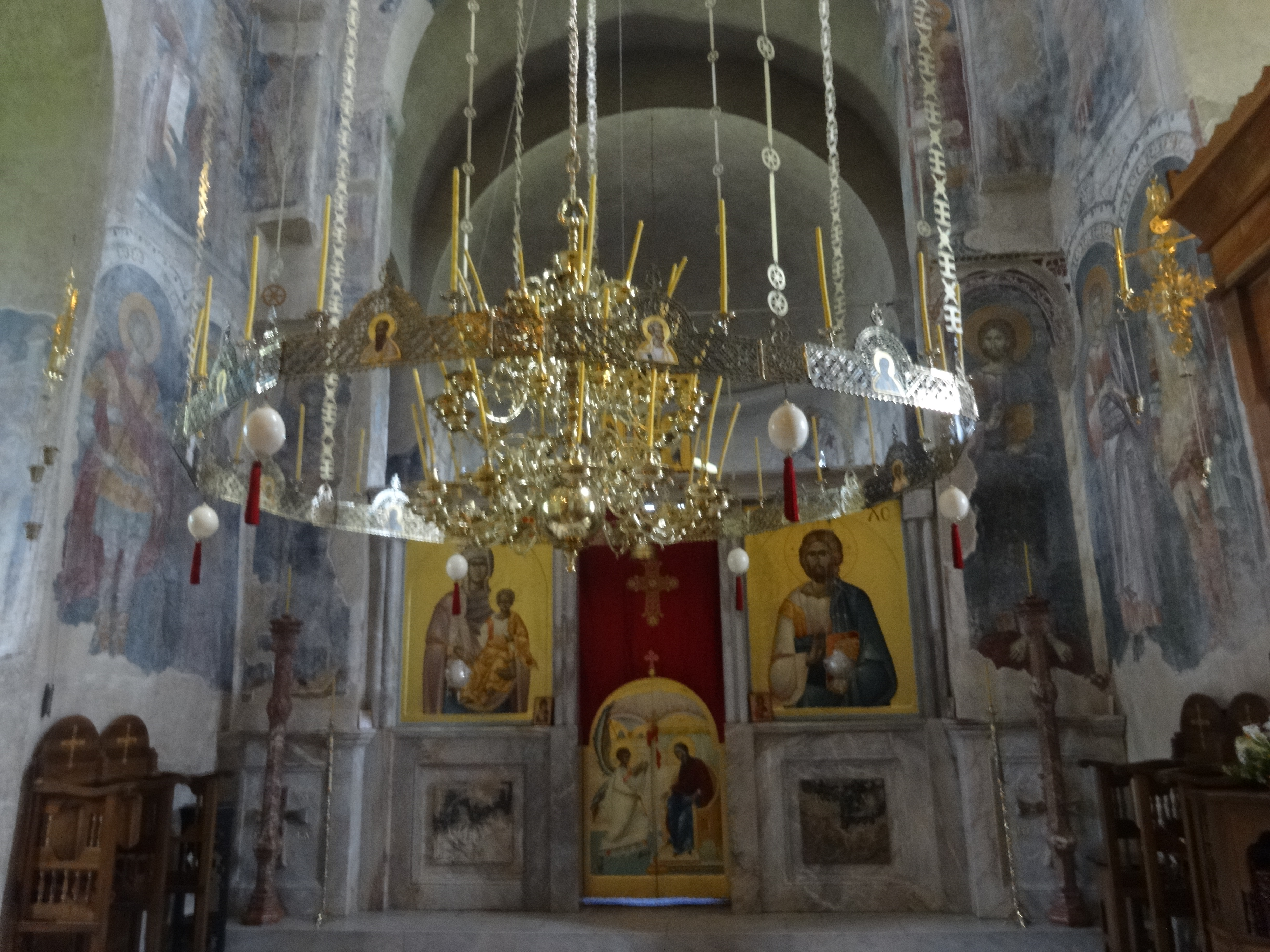 Жича је српски средњовековни манастир из прве половине 13. века, који се налази у близини Краљева. Подигао ју је први краљ Србије, Стефан Немањић.